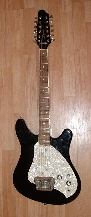 Squier Vista Venus XII ?